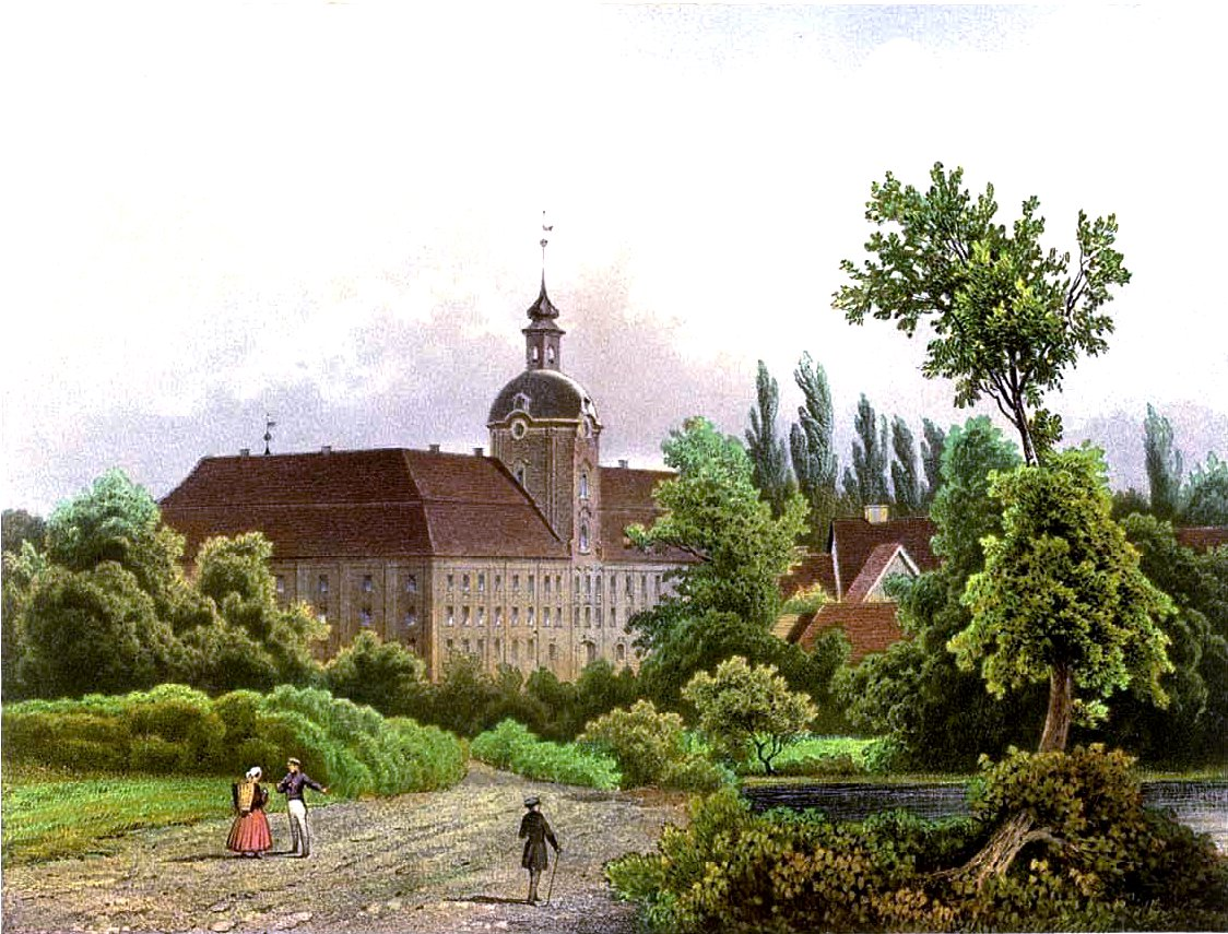 Schloss Lieberose, Kreis Lübben